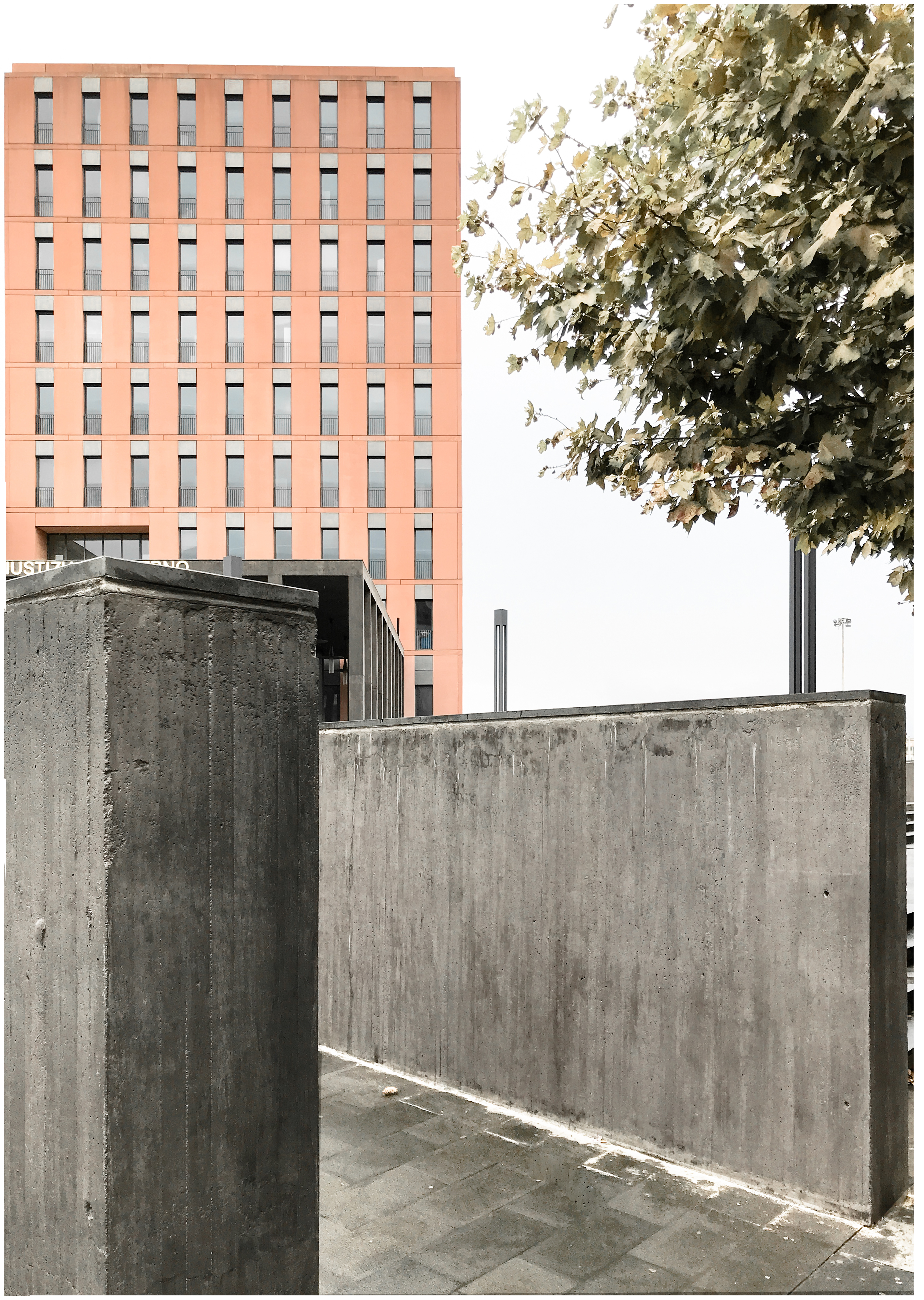 Vista dell'ingresso della cittadella